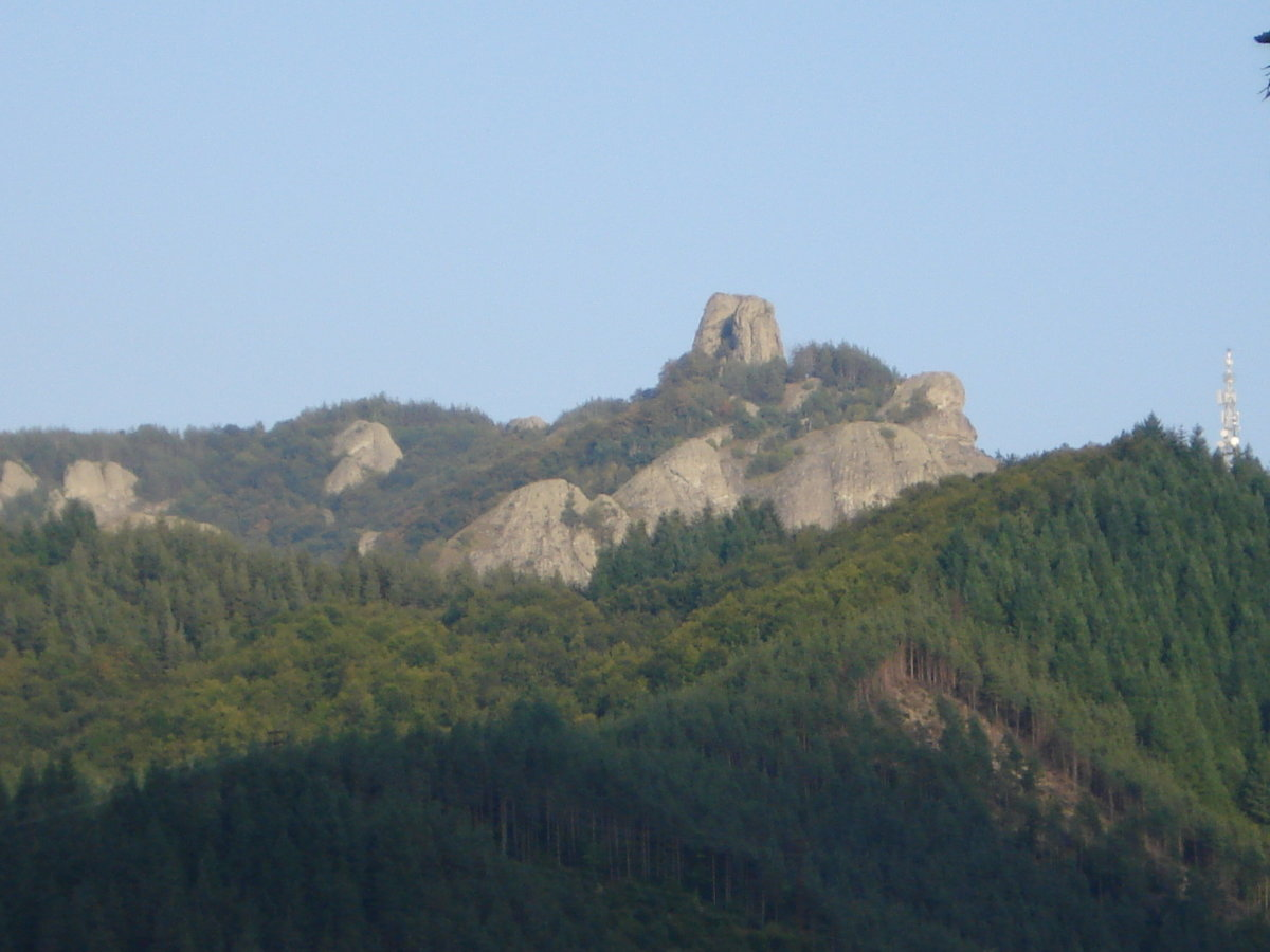 Изглед към крепостта Рим папа в Рудозем.